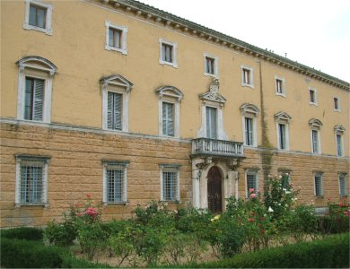 Castelnuovo Berardenga, Villa Chigi